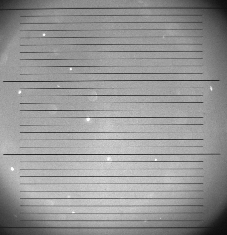 Aufnahme der Öltröpchen beim Millikan-Versuch, zwei im Fokus des Mikroskops, mehrere Unscharfe leicht außerhalb des Fokus ebenfalls sichtbar